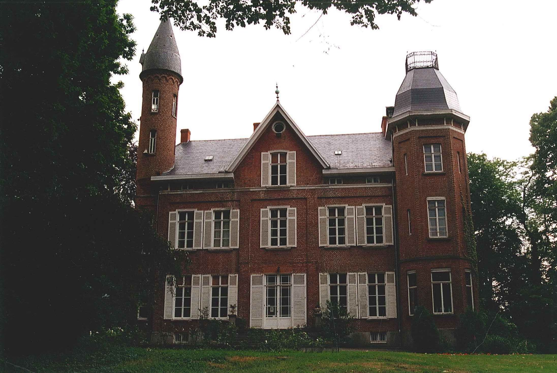 Kruisem Waregemsestraat 33-35